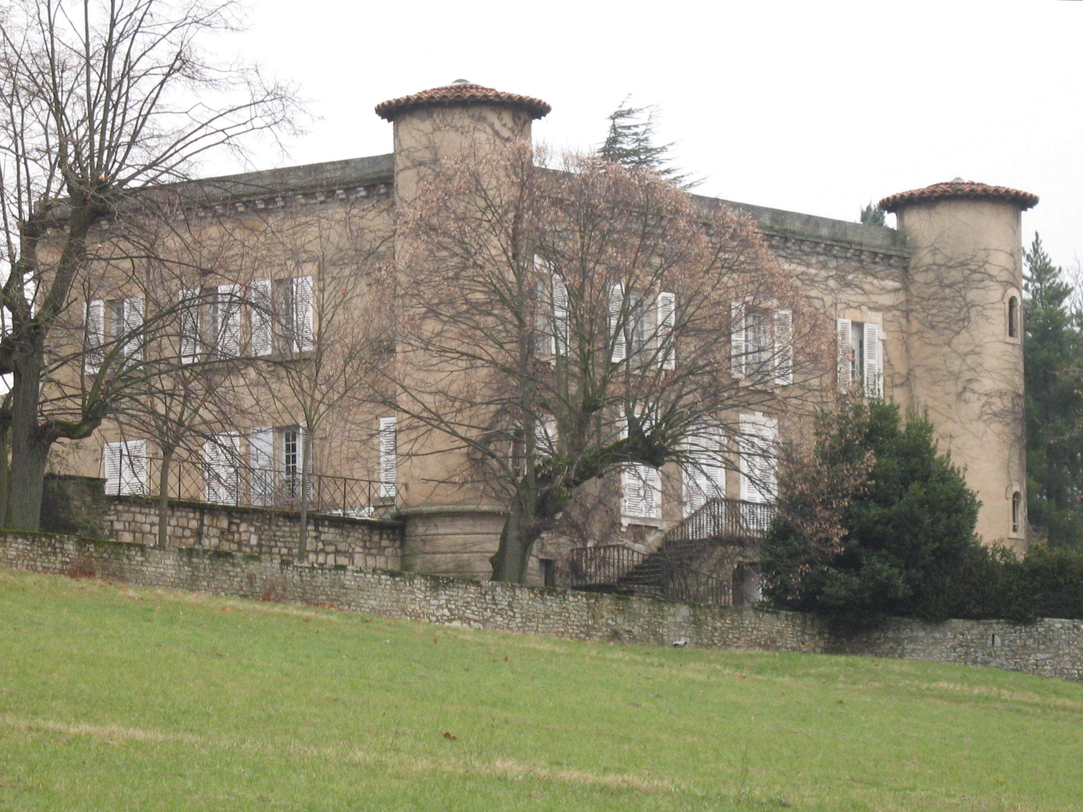 Château des Bassieux à Anse dans le Rhône